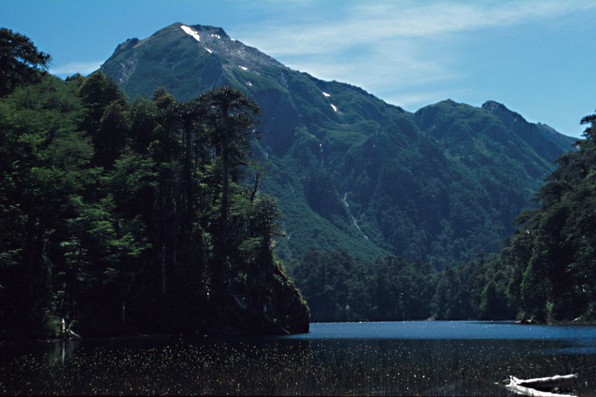 Lago Toro, Sendero de los Lagunas, Parque Nacional Huerquehue, Region Araucania, Chile Autor: Roswo, Rosenwirth-Dia own work Original: KB-Diapositiv